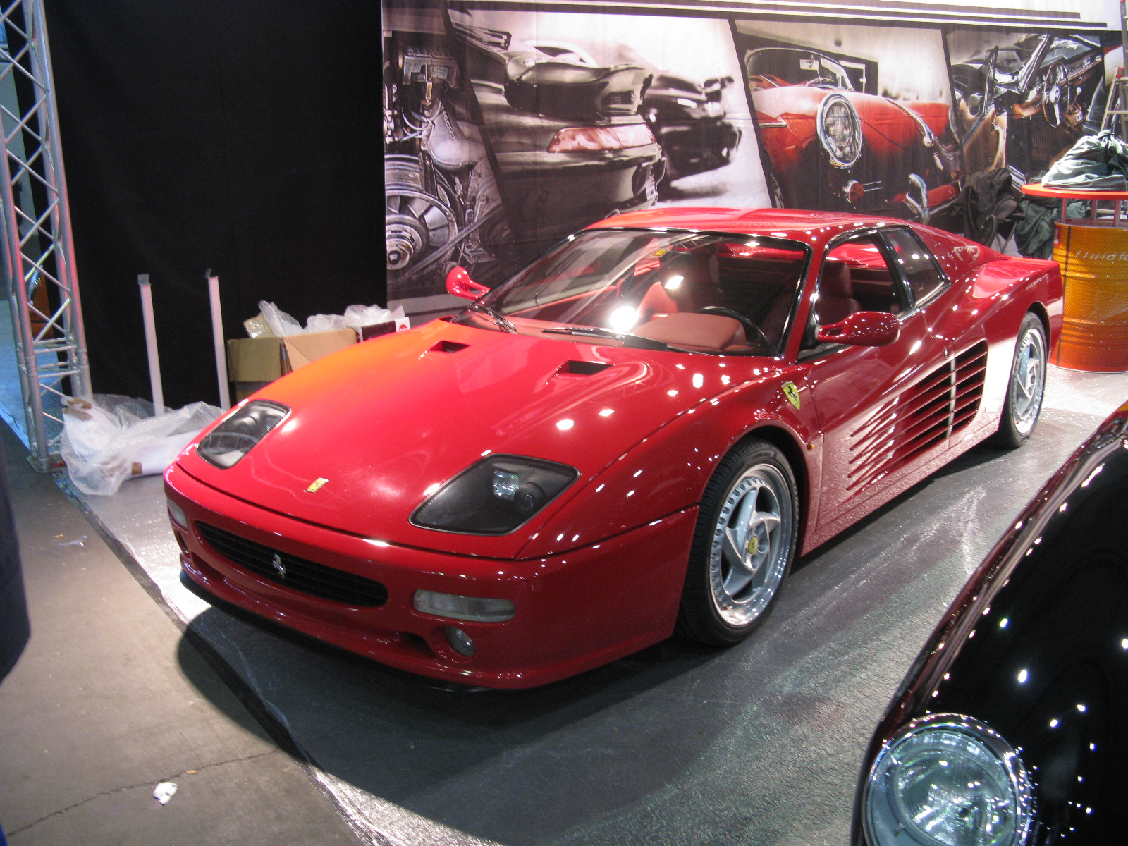 Ferrari F512M